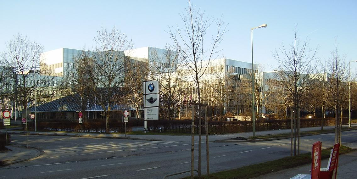 Forschungs- und Innovationszentrum (FIZ) des Automobilherstellers BMW München (Munich / Germany) (Haupteingang von der Knorrstraße)